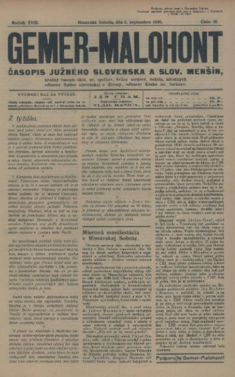 Titulný list časopisu Gemer - Malohont